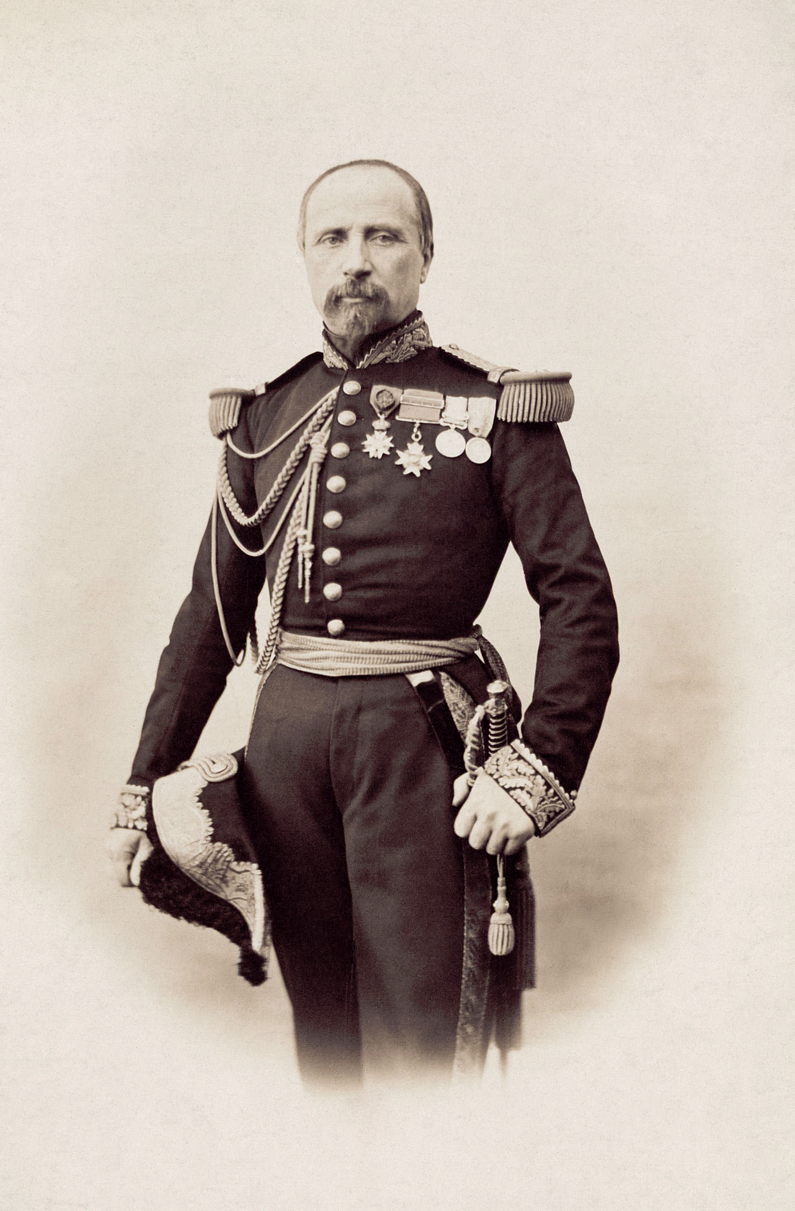 Portrait-Photo des französische Generals Claude Théodore Decaen (1811-1870)